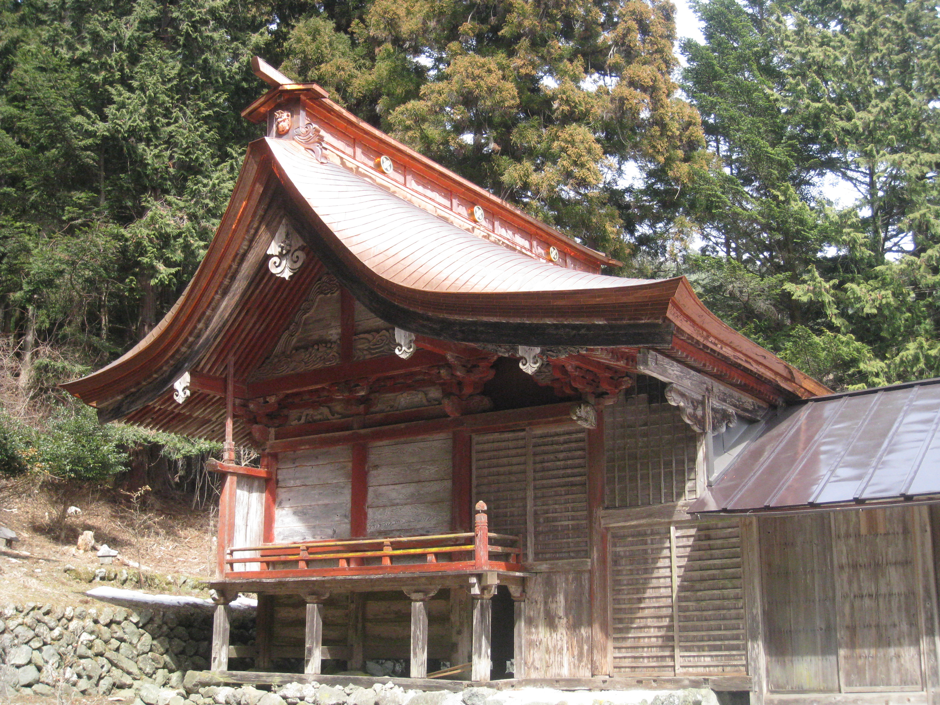 穂見神社 本殿